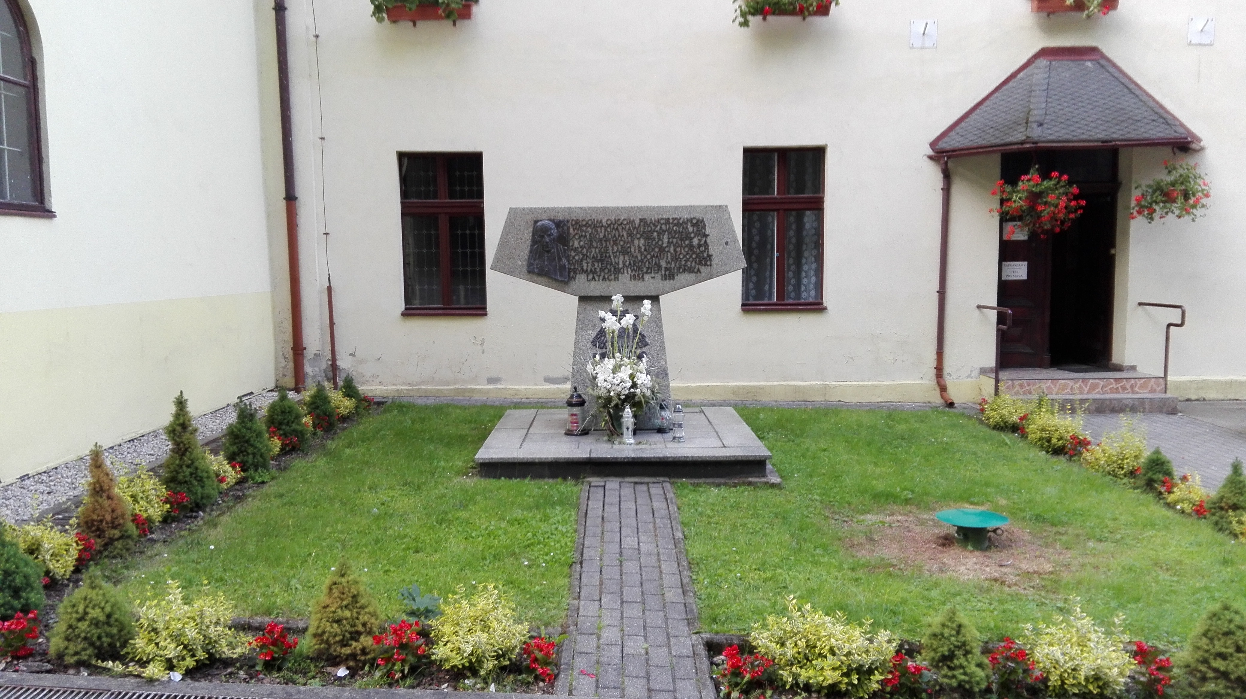 Prudnik Las Klasztor Zakonu Braci Mniejszych, Pomnik Prymasa Stefana Wyszyńskiego. Klasztor na przeszło rok 1954–55 był więzieniem dla Prymasa Kardynała Stefana Wyszyńskiego oraz dwóch współwięźniów: Ks. Stanisława Skorodeckiego i siostry zakonnej Leonii Graczyk